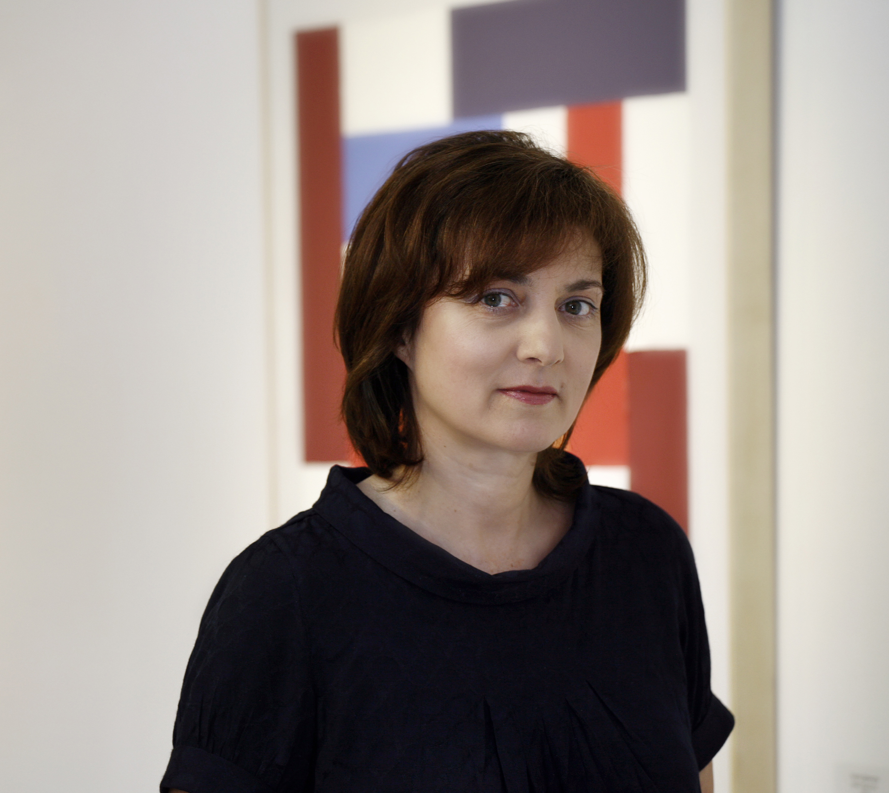 Maria Vasileva